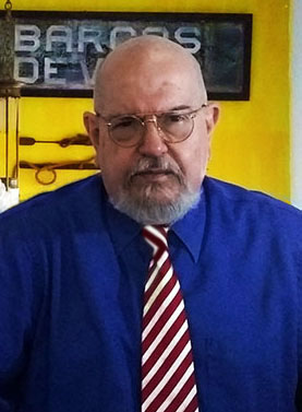 Ivan Feo Garcia, venezolano, director de cine, guionista, actor, profesor de la Universidad Central de Venezuela